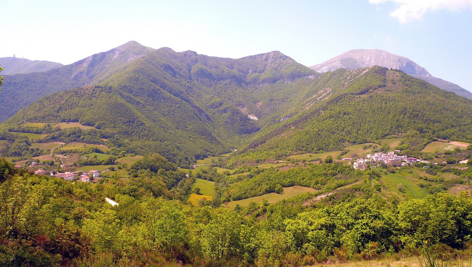 Piaggiasecca (a destra) vista da Monte Miesola.